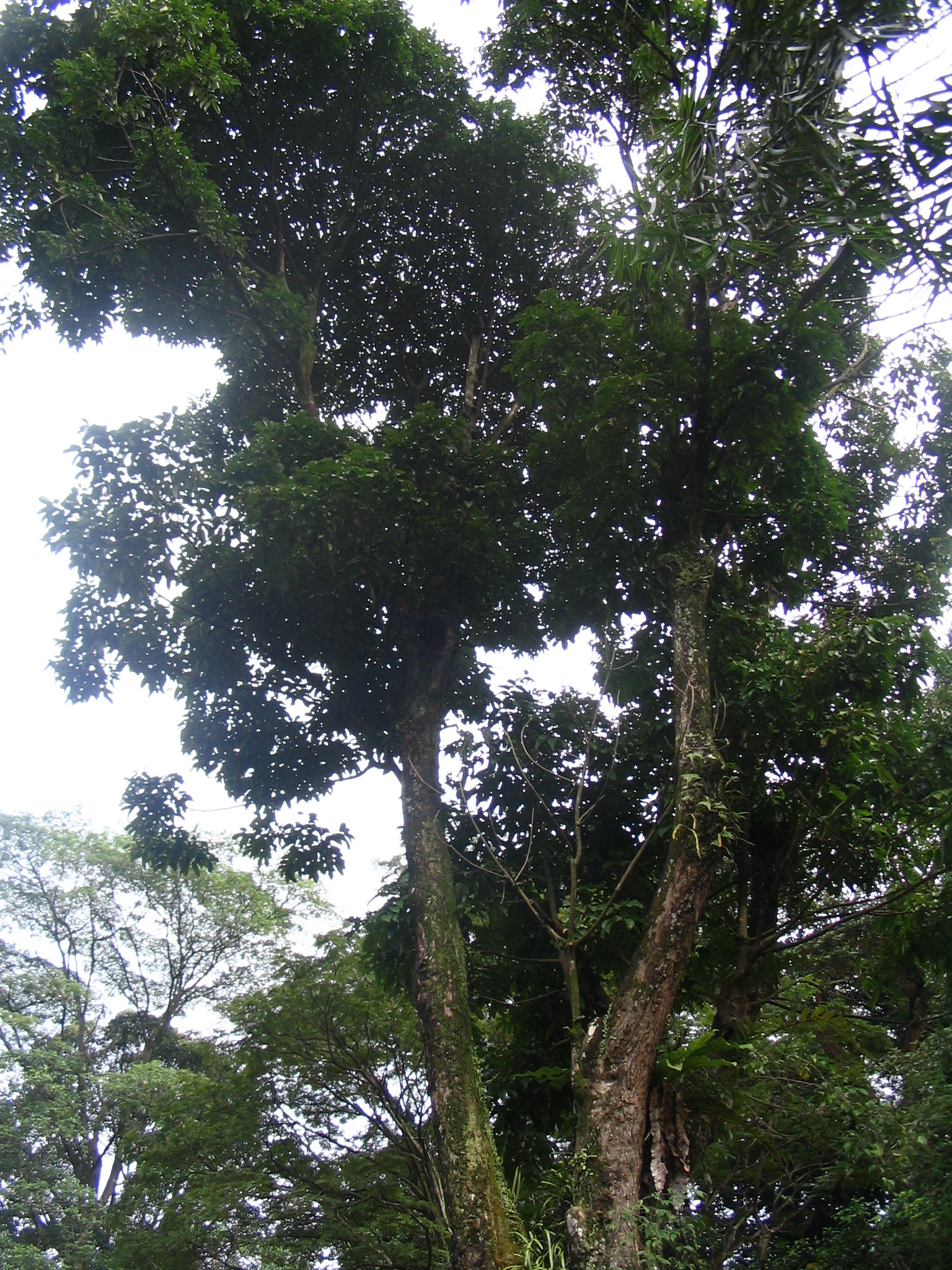 Callerya atropurpurea - Bukit Nanas Forest Reserve - Kuala lumpur